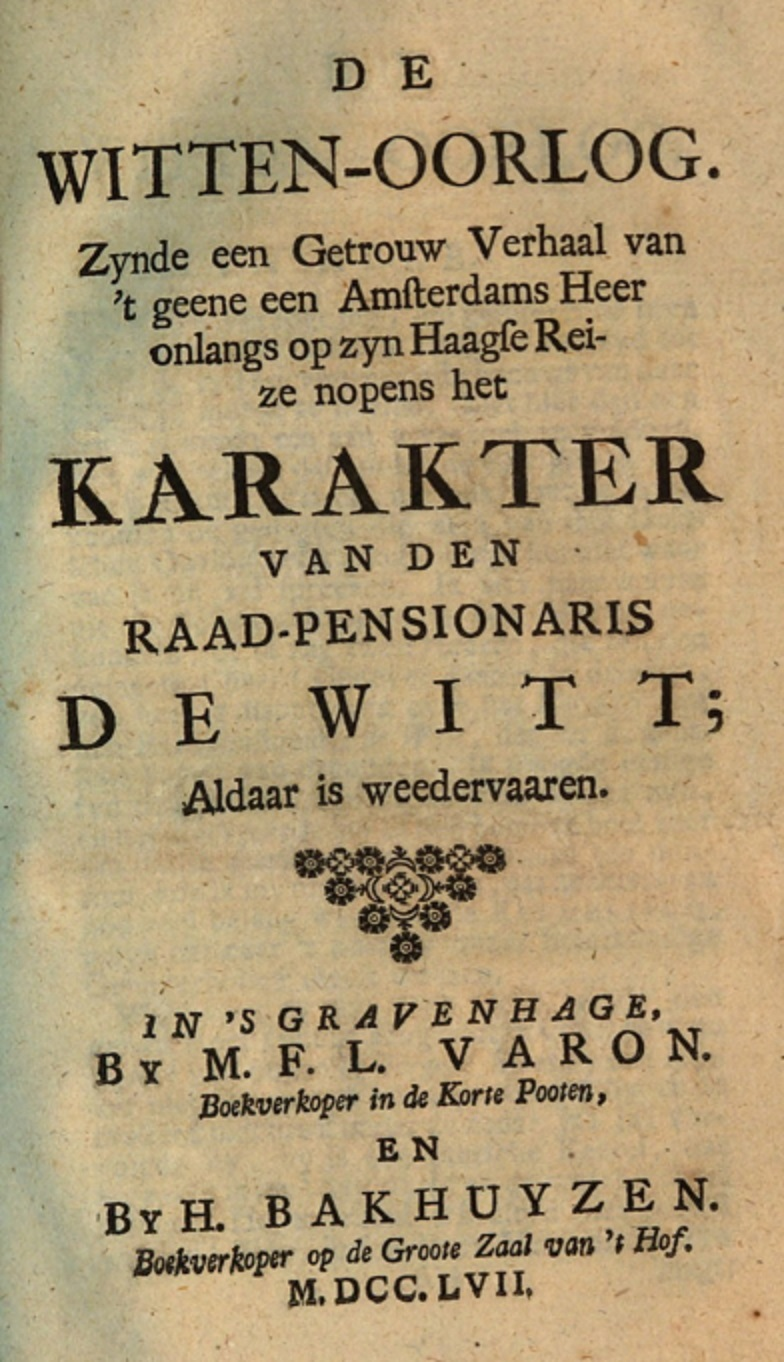 De Witten-Oorlog: Zynde een Getrouw Verhaal van 't geene een Amsterdams Heer onlangs op zyn Haagse Reize nopens het Karakter Van Den Raad-Pensionaris De Witt; Aldaar is weedervaaren